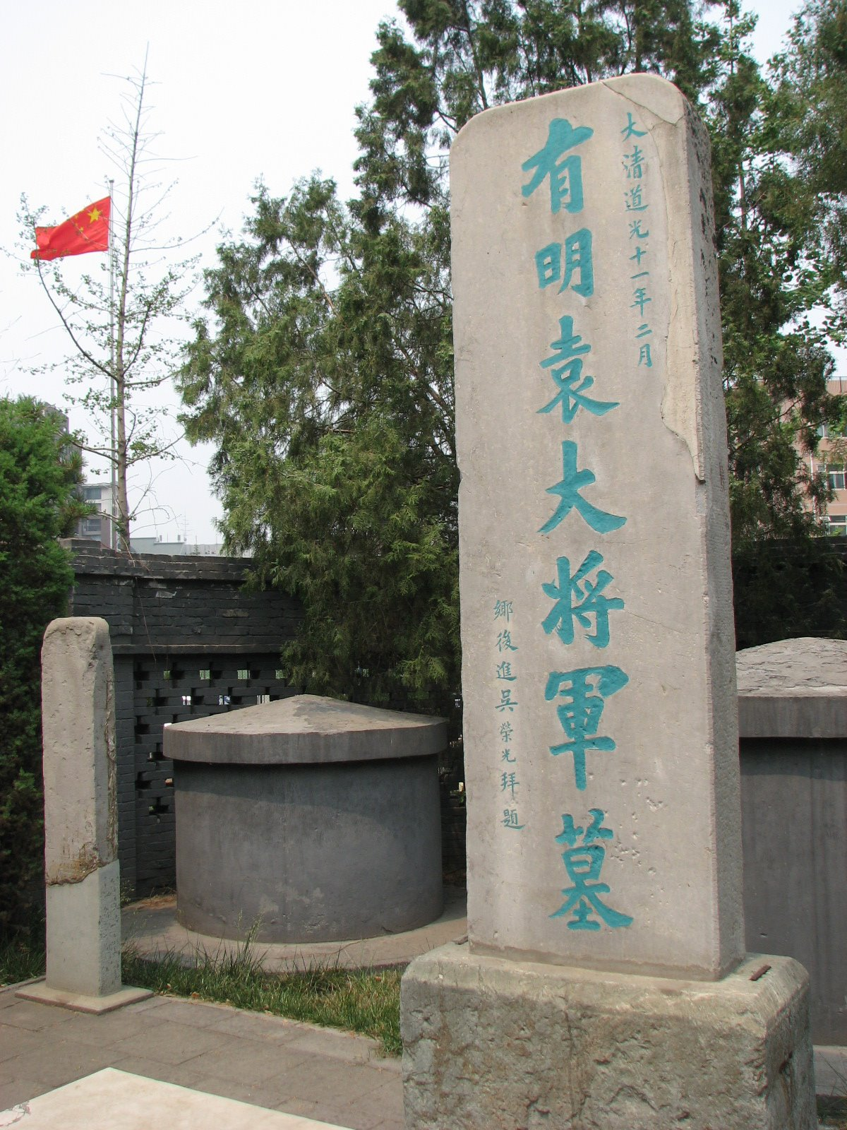 袁崇焕祠堂中的墓碑。